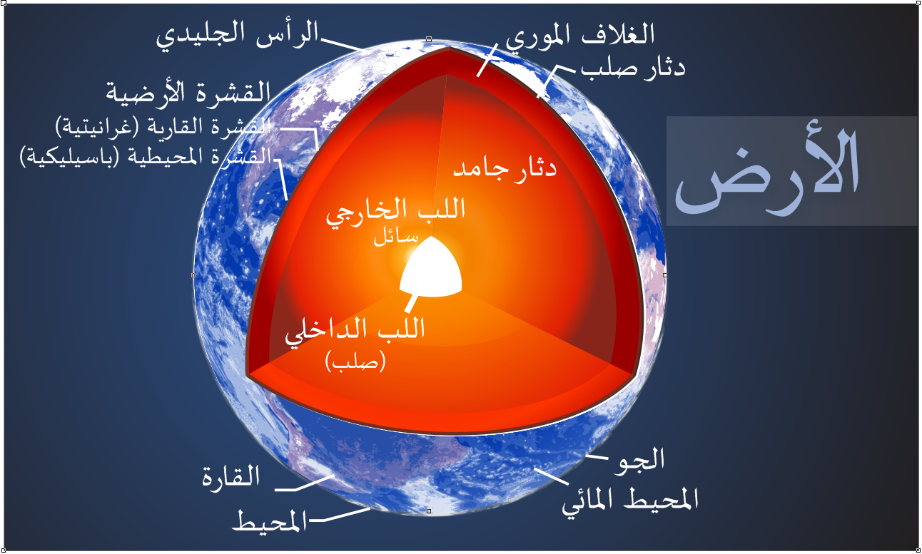 الترجمة للأبولؤيKelvinsong قشرات كوكب الأؤض - العمل الأصلي لـ